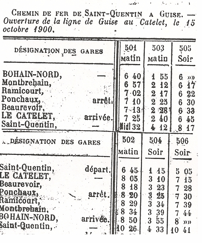 Horaire 1900